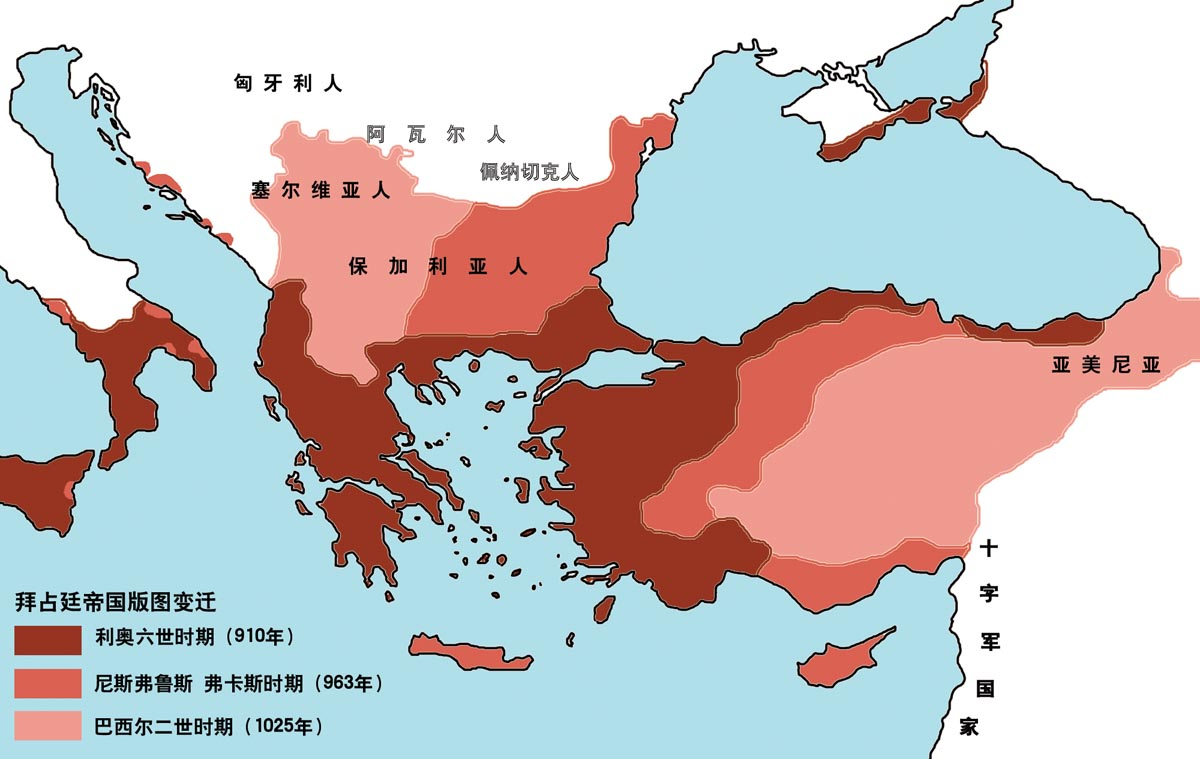 公元1081年时的zh:拜占庭帝国疆域